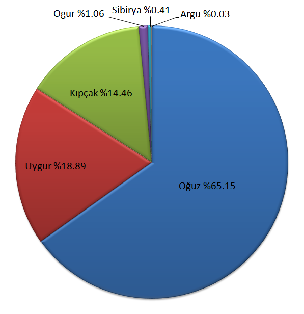 == Lisans ==